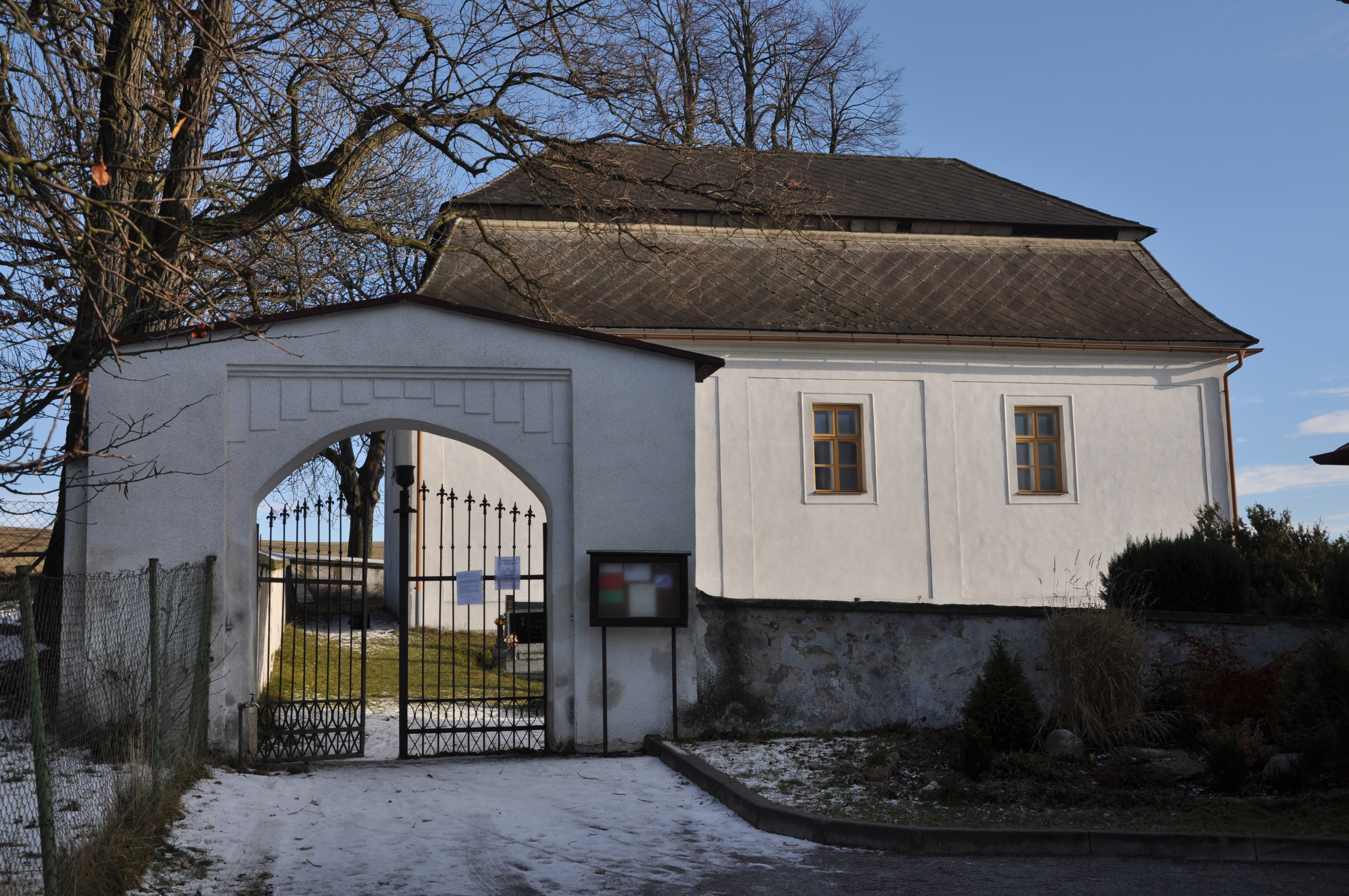 Fara u kostela v Daňkovicích